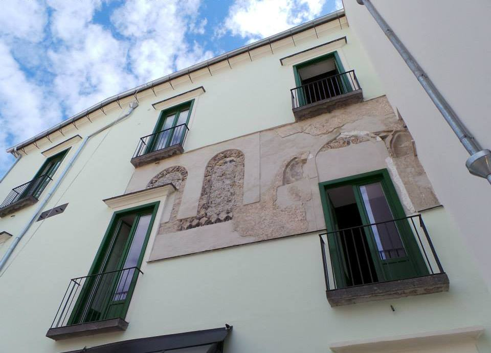 Monofore a Palazzo Fruscione